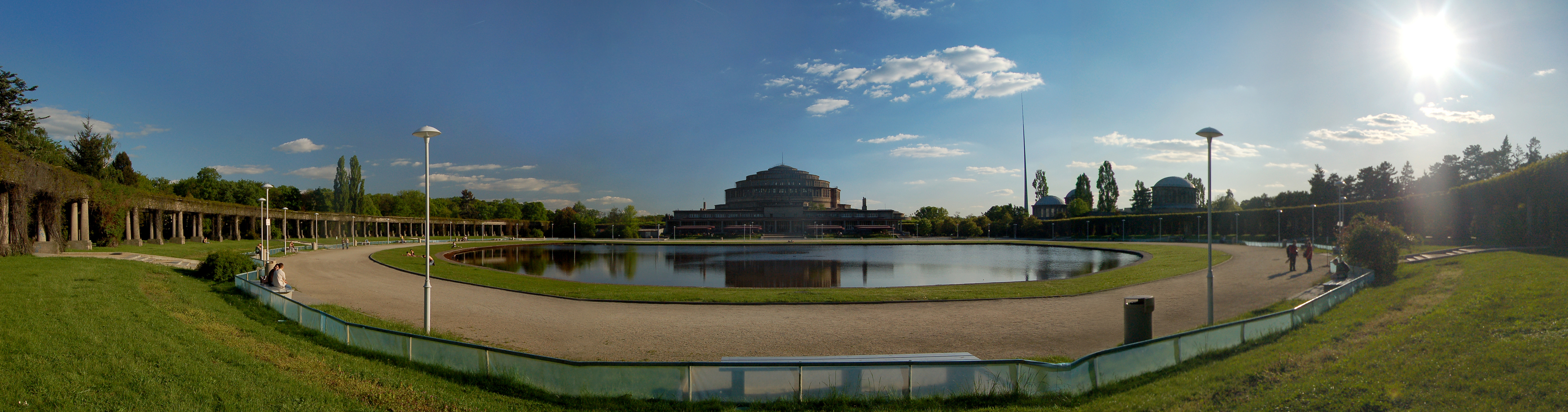 Hala Ludowa